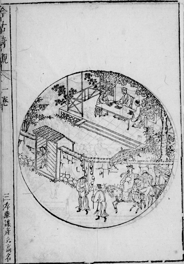 Titre : 今古奇觀 Jin gu qi guan. Merveilles de l'antiquité et des temps modernes. I, livre 1 三孝廉讓產立高名 San xiao lian rang chan li gao ming. Les trois licenciés charitables qui acquièrent de la célébrité. Description : Recueil de 40 contes imprimé par les soins de Bao weng lao ren et de Mo han zhai ; gravé à Wu, au pavillon Bao han (époque des Ming). Préface par Xiao hua zhu ren, de Gu su. Notes en haut des pages ; illustrations soignées, une par nouvelle. Description : Provenant de la bibliothèque de l'Arsenal. Source : Bibliothèque nationale de France, Département des manuscrits, Chinois 4259